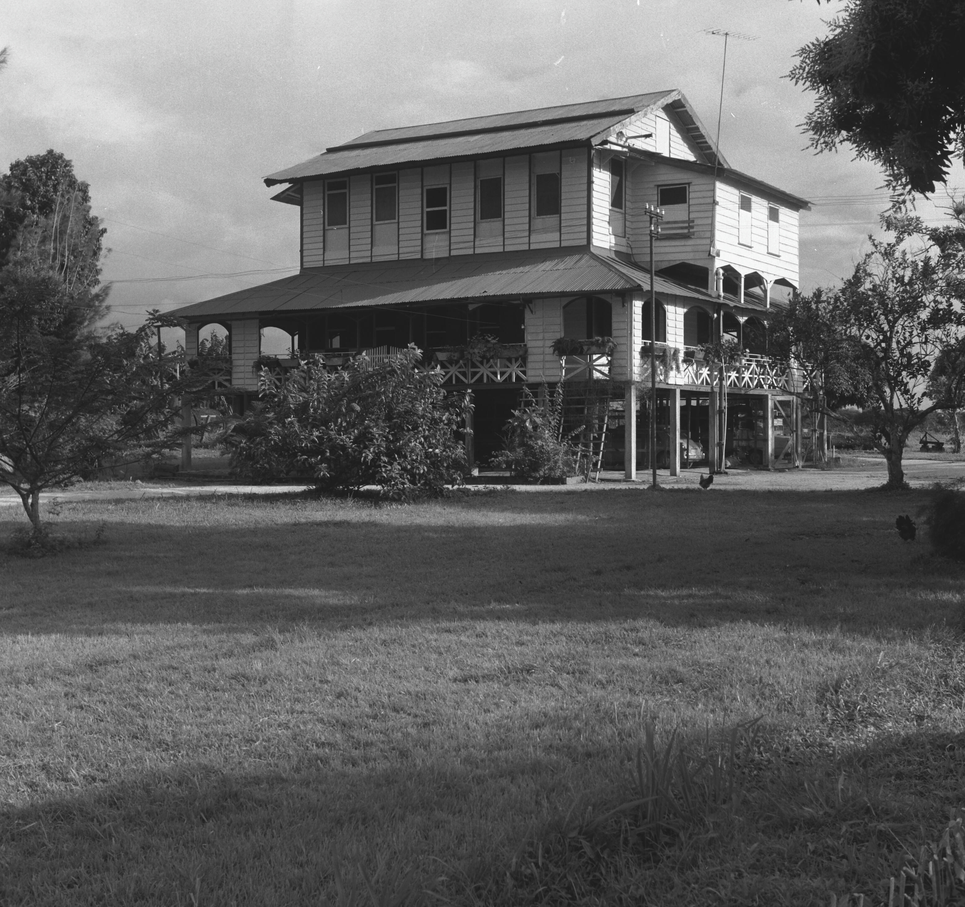 Plantage, directeurswoningOnderwerp: plantages